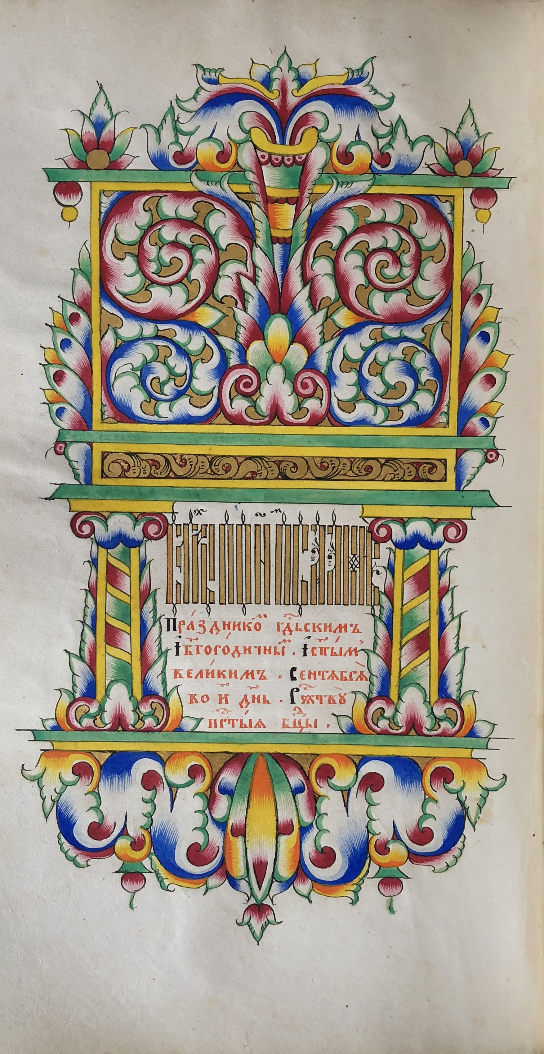 Рукопись "Праздники деместенного распева" (Гуслицы, конец 19 века; частное собрание)